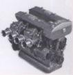 Motore Bandini 750 c.c. prima serie tratta da Libro: Bandini (storia della vita e automobili di Ilario Bandini)